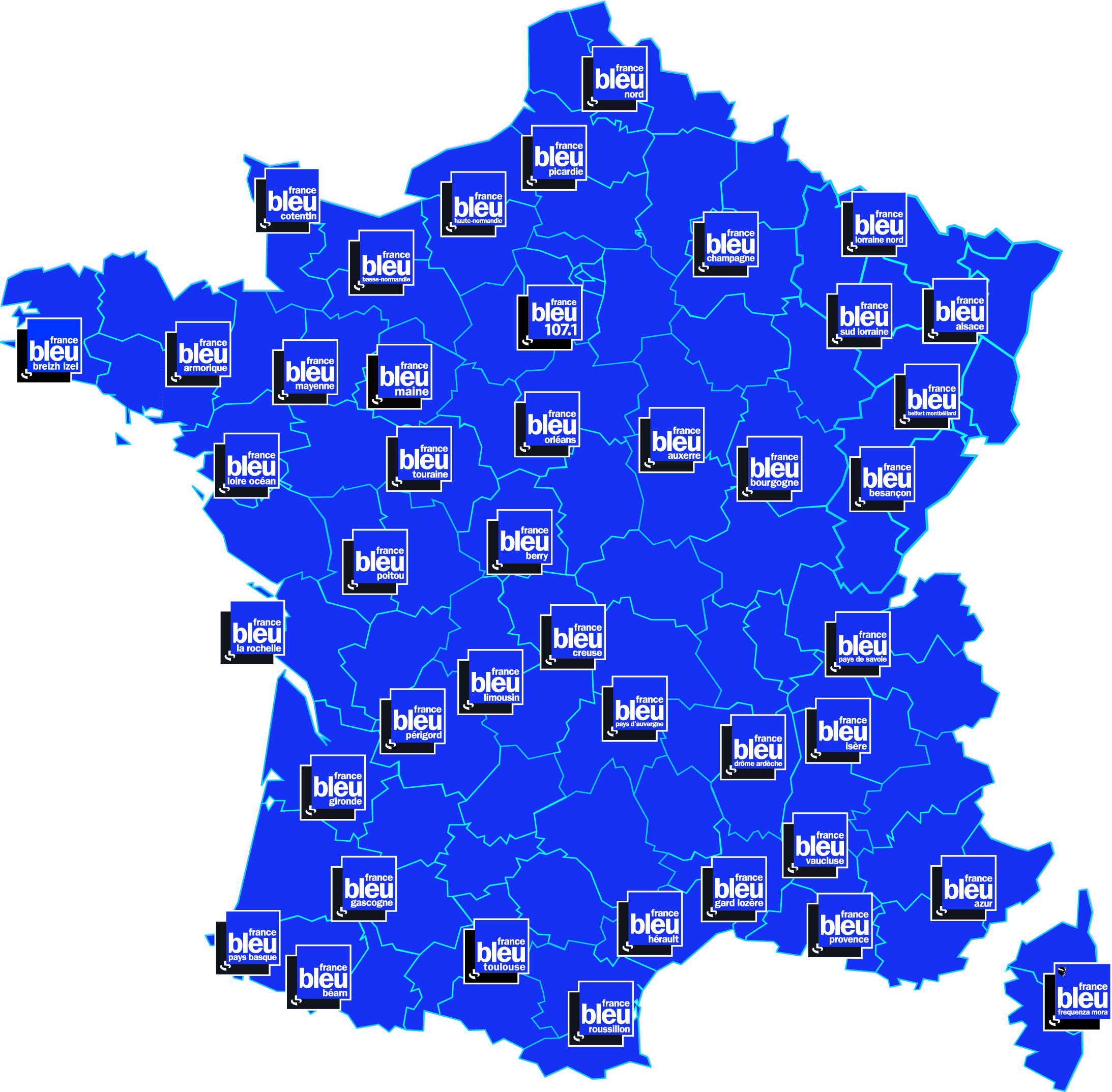 Carte des radios locales de France Bleu